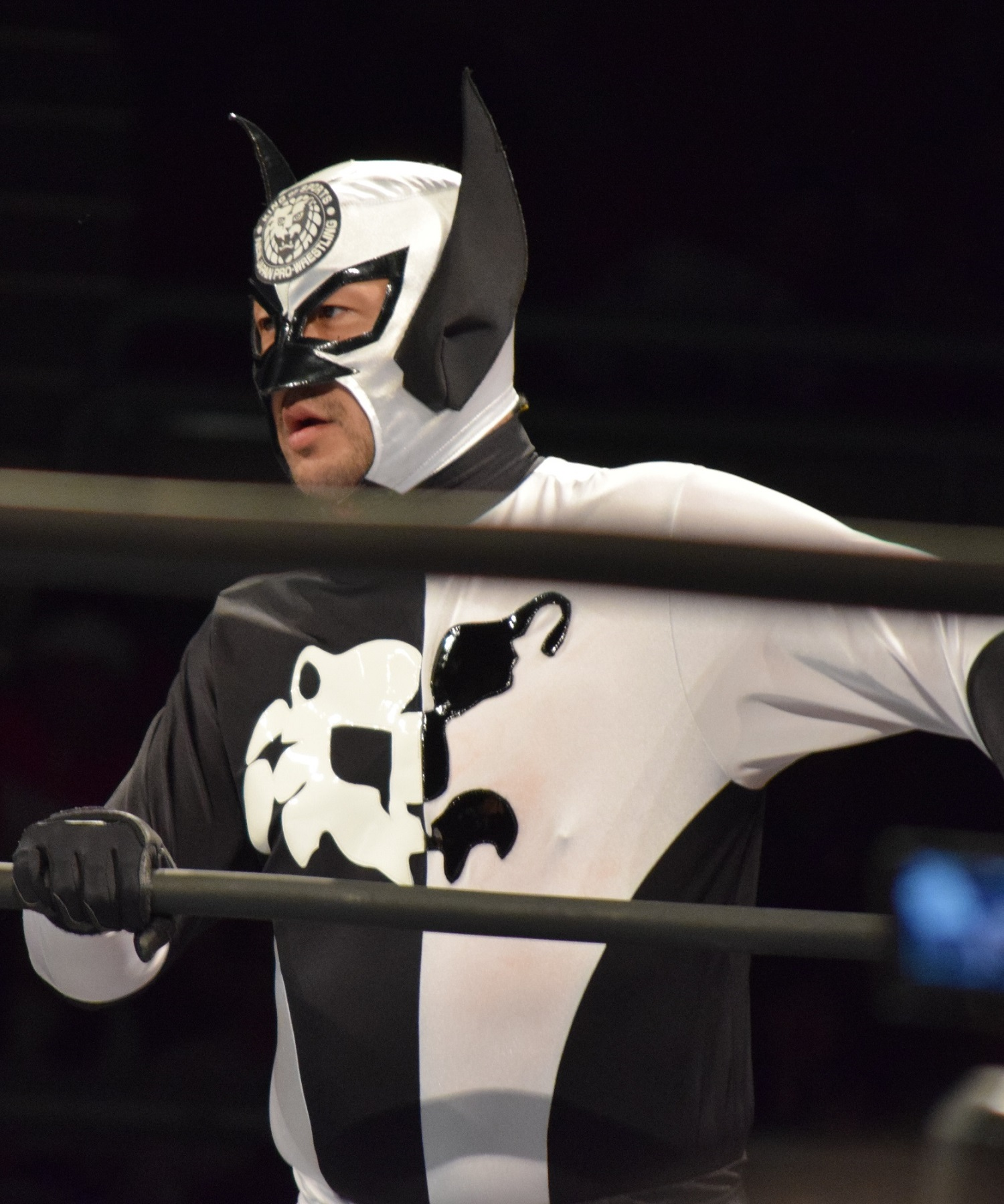 2016年3月20日 ベイコム総合体育館「Road to INVASION ATTACK 2016」 キャプテン・ニュージャパン